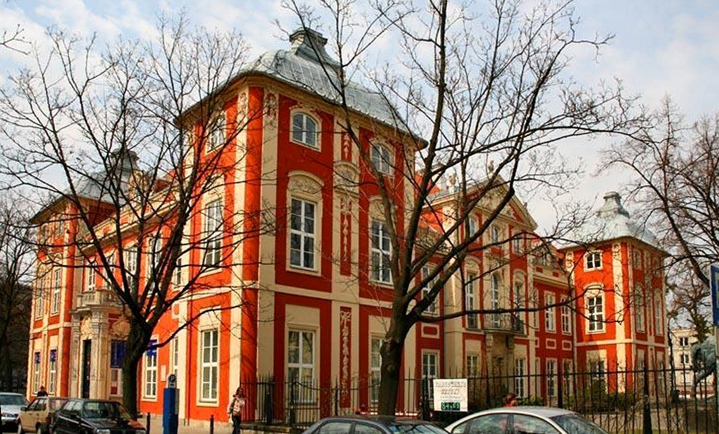 Warszawa (Polska)